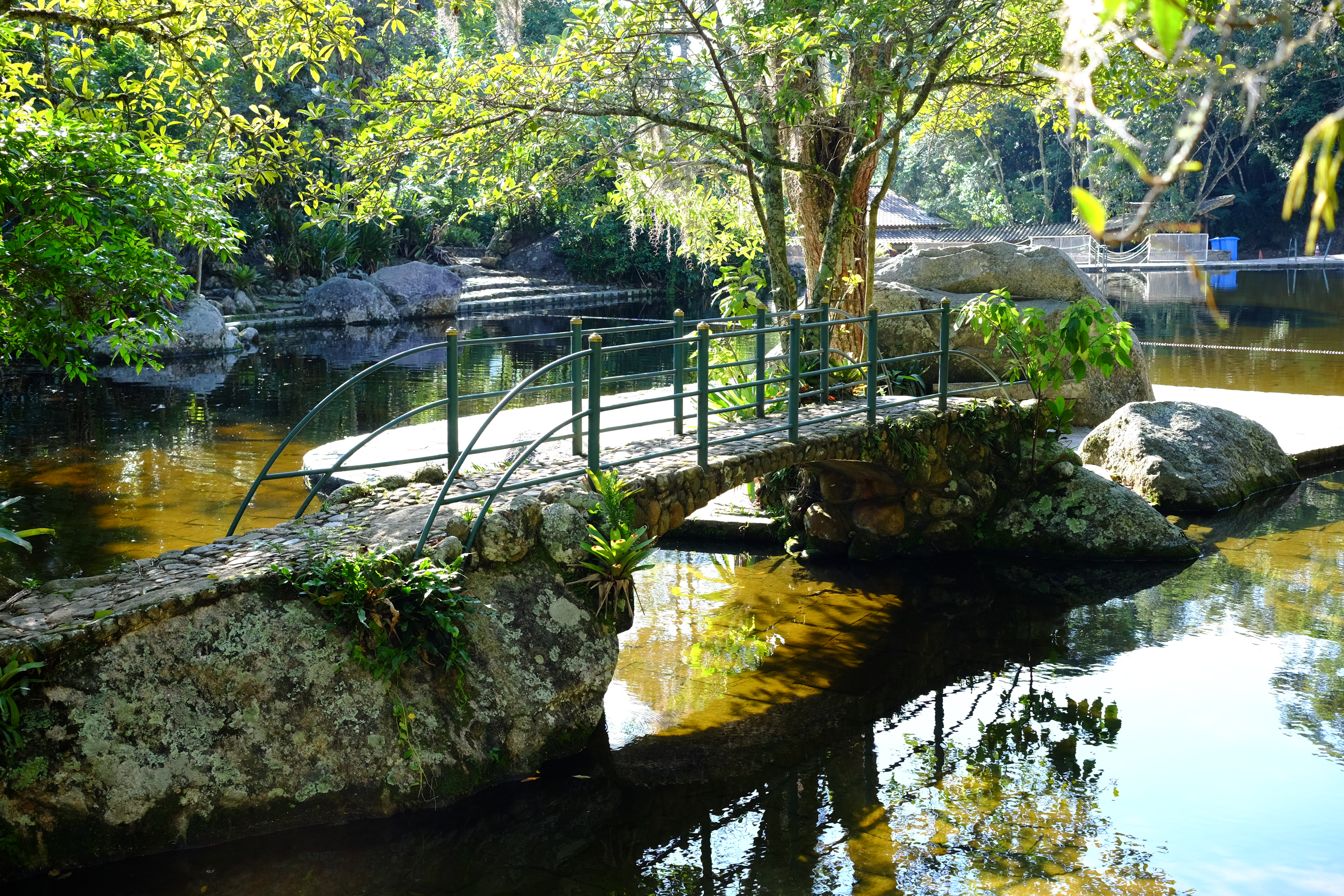 Parque nacional Da Serra Dos Orgaos - Piscina Natural Teresopolis